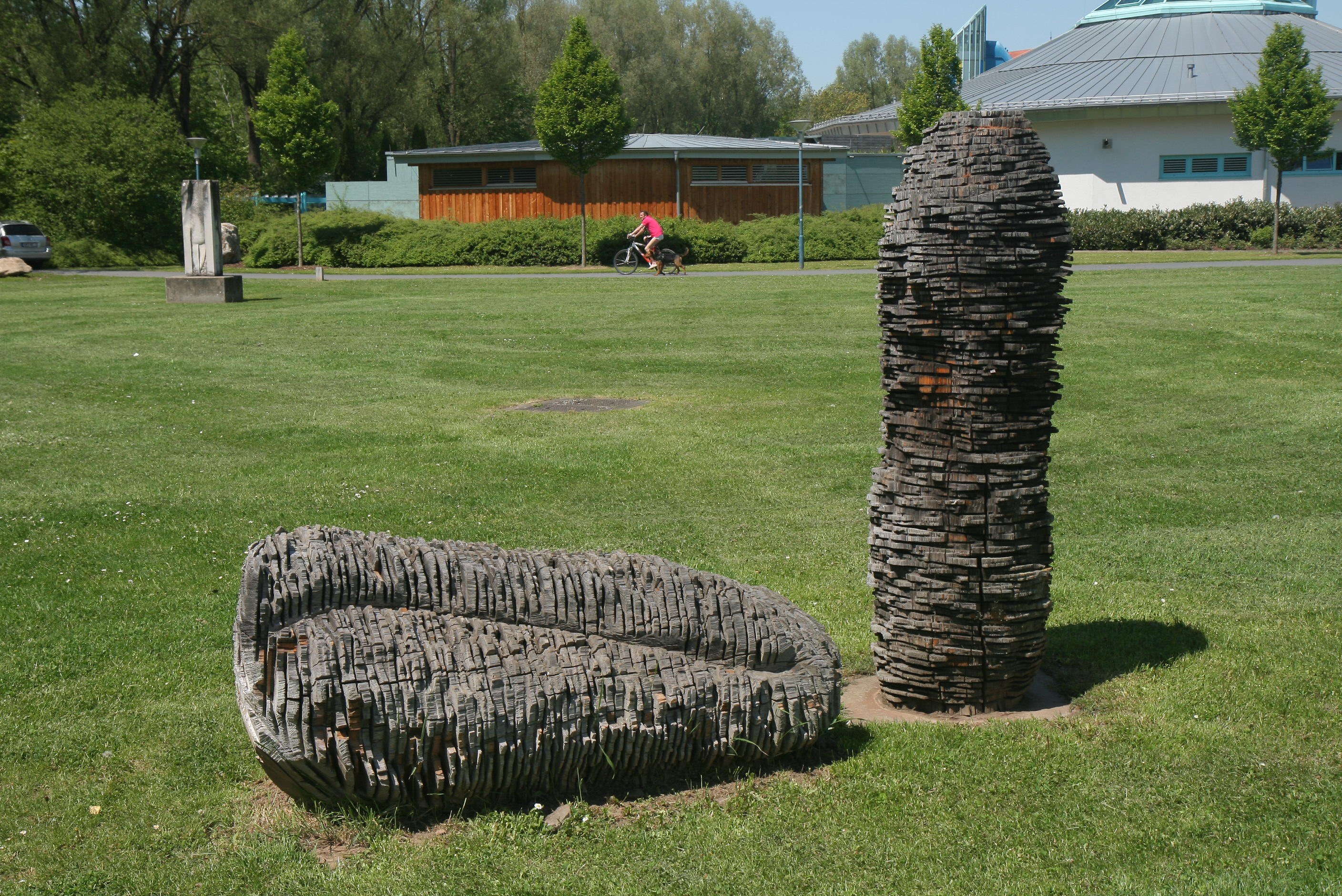 Amberger Skulpturenweg in Amberg. Holzskulptur "Ein Paar". Künstler: Belle Shafir aus Tel-Aviv.